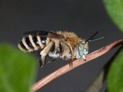 Amegilla sp. (probably A. albigena) Palermo